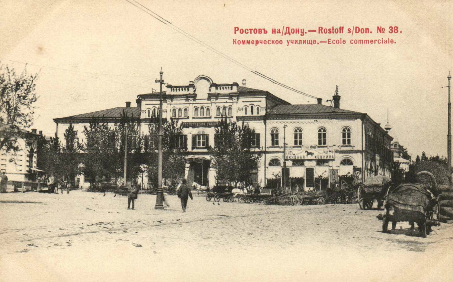 Коммерческое училище в Ростове-на-Дону РФ (дом Максимова)